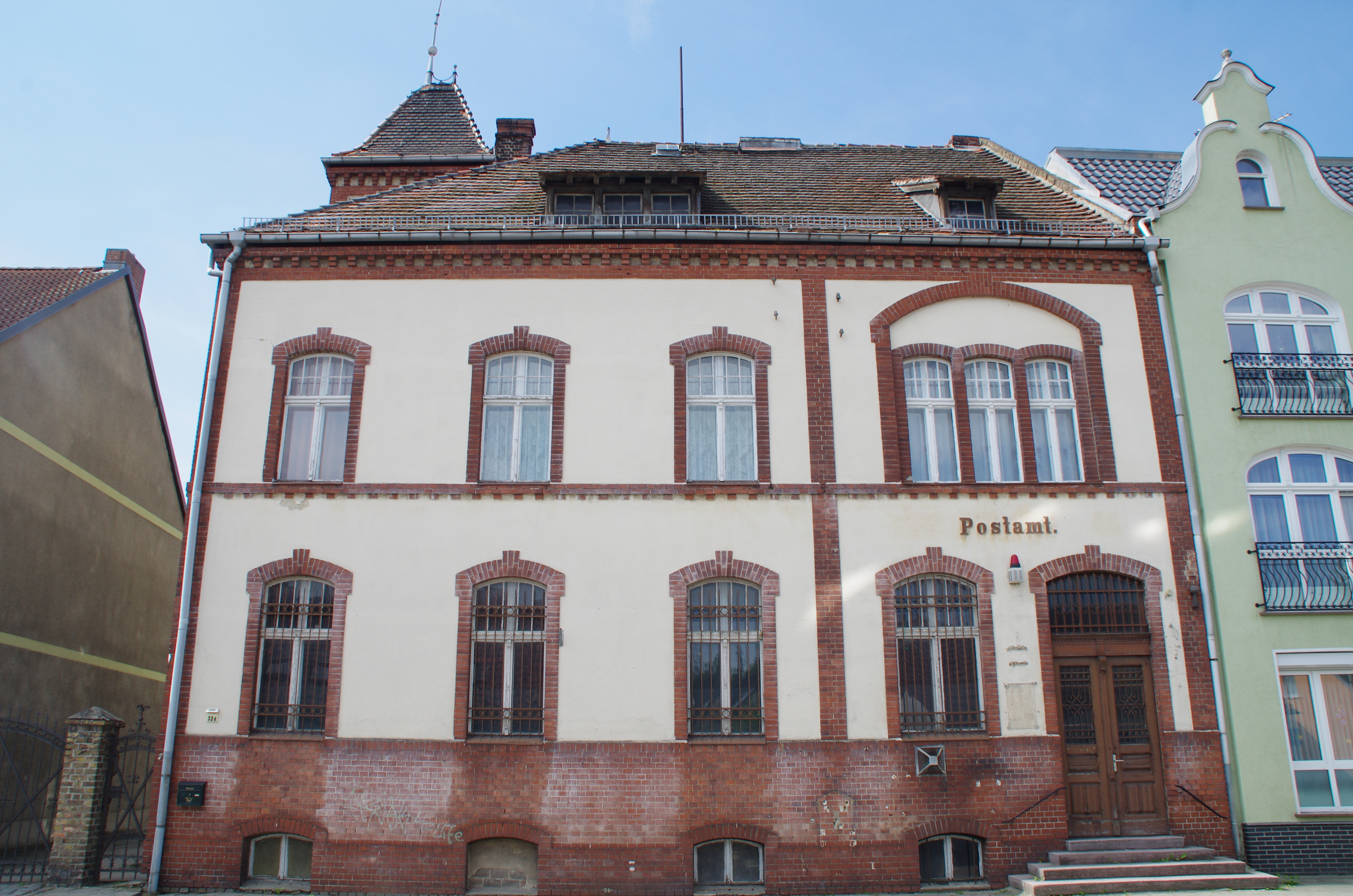 Trebbin in Brandenburg. Die ehemalige Post in der Bahnhofstraße steht unter Denkmalschutz.